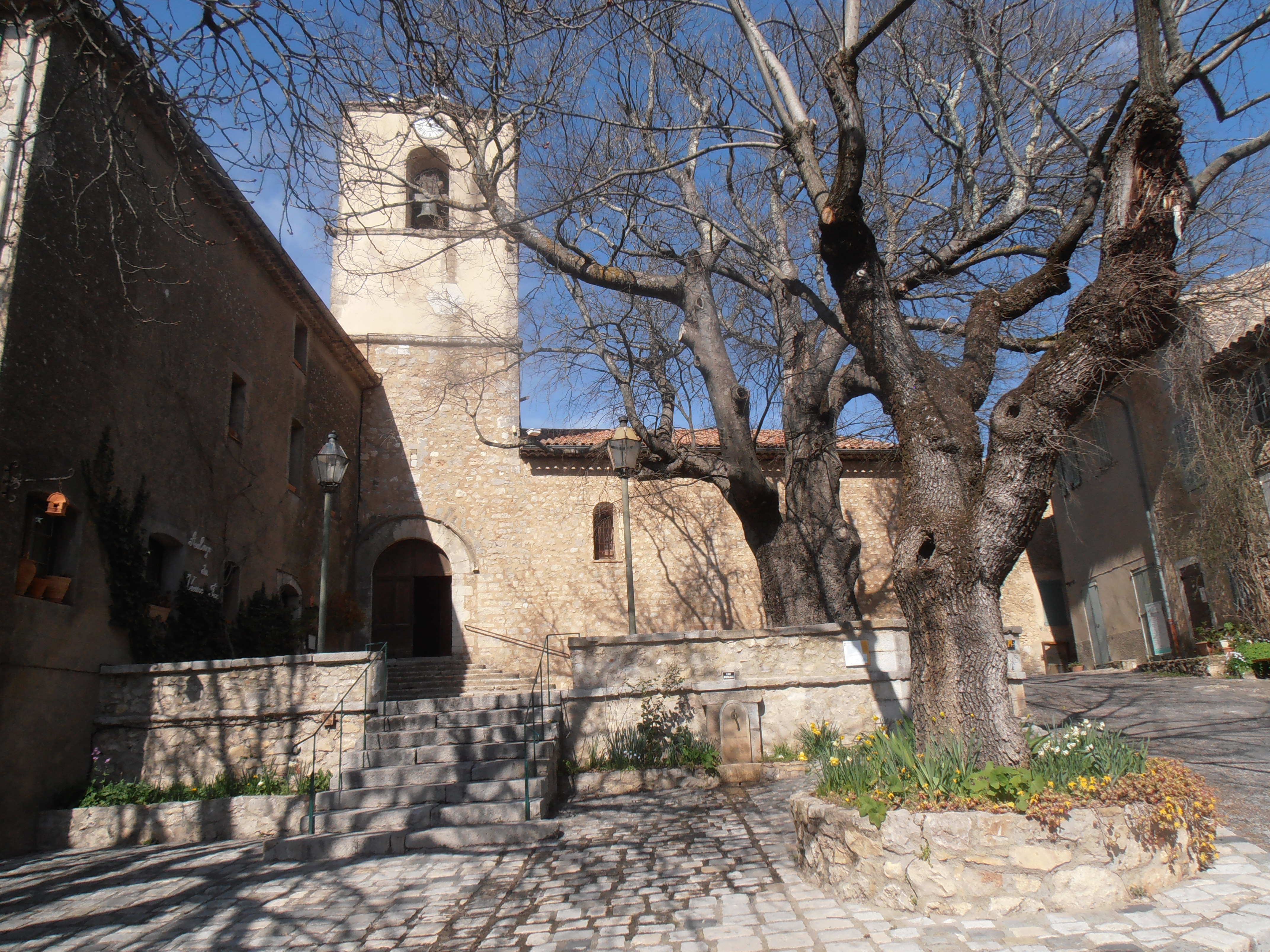 L'église paroissiale, pour sa partie XIIIème siècle. Réparée à de nombreuses reprises, elle fut agrandie par l'adjonction de chapelles latérales pendant la deuxième moitié de XIXème siècle. Son clocher carré, orné de gargouilles, porte un campanile construit en 1715. Sur le parvis se dresse un micocoulier planté en 1550. Attenant à l'église, l'ancien prieuré des Hospitaliers (ayant servi de presbytère au XVIe siècle) porte aujourd'hui le nom d'Auberge du Vieux-Fox" (sources : panneau signalétique sur la place du village.)